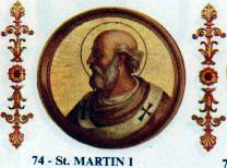 Pope Martin I